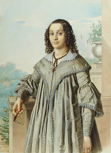 Партрэт Г. І. Дараган (Ганны). Папера на кардоне, акварэль, бялілы, лак